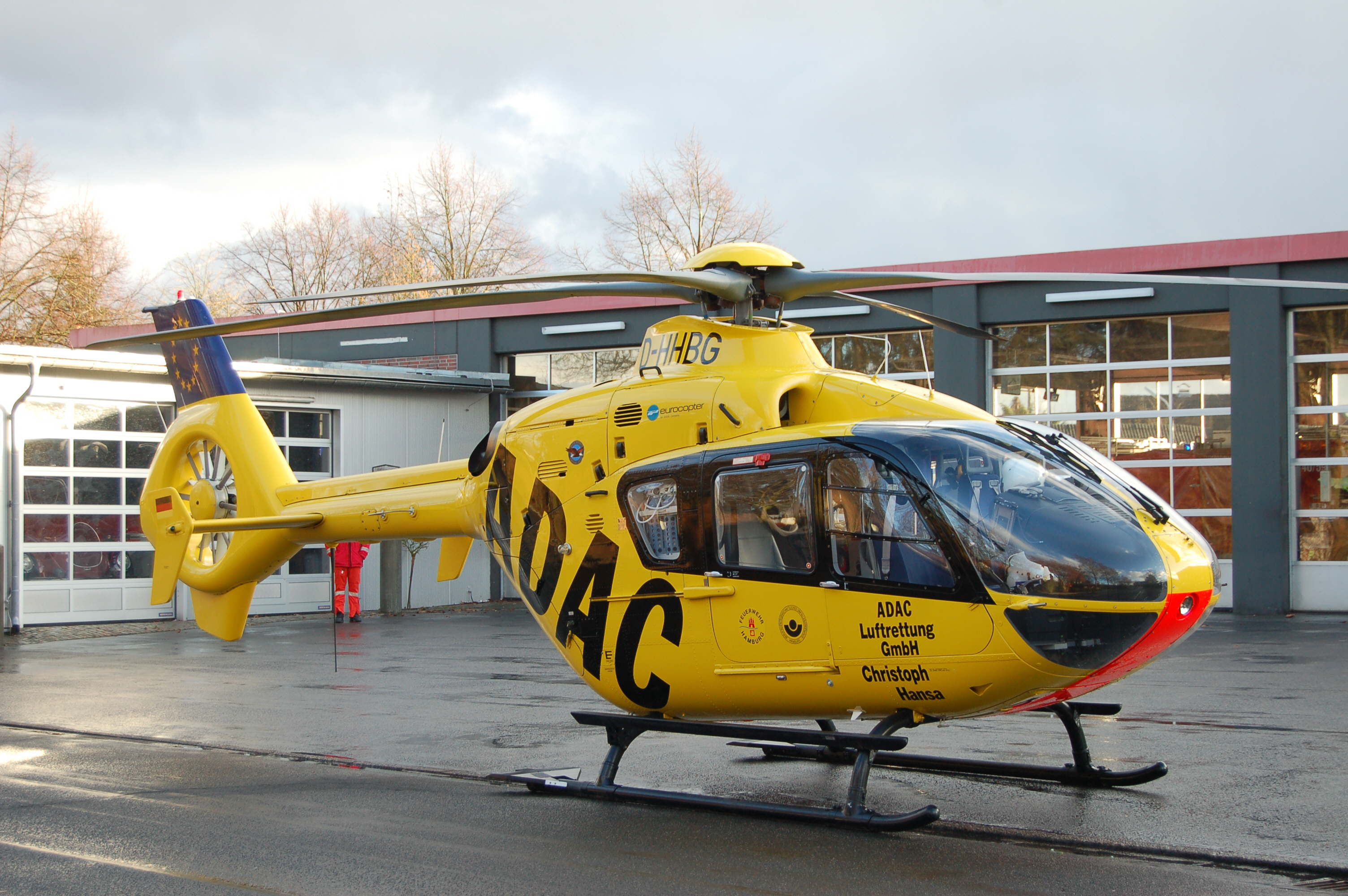 Rettungshubschrauber 'Christoph Hansa' seit 1990 in Hamburg Stationiert (die EC 135 ist seit dem 20.06.2007 in Hamburg) bei einem Einsatz in Uetersen Kennung: D-HHBG